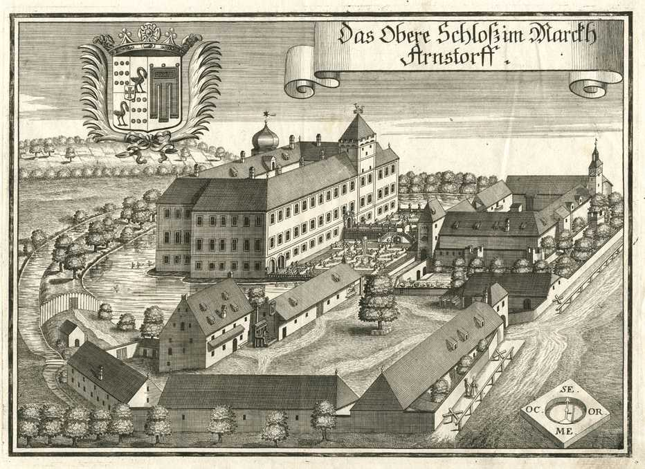 “Oberes Schloß Arnstorf”, aus: Beschreibung des Churfürsten- und Hertzogthumbs Ober- und Nidern Bayrn.